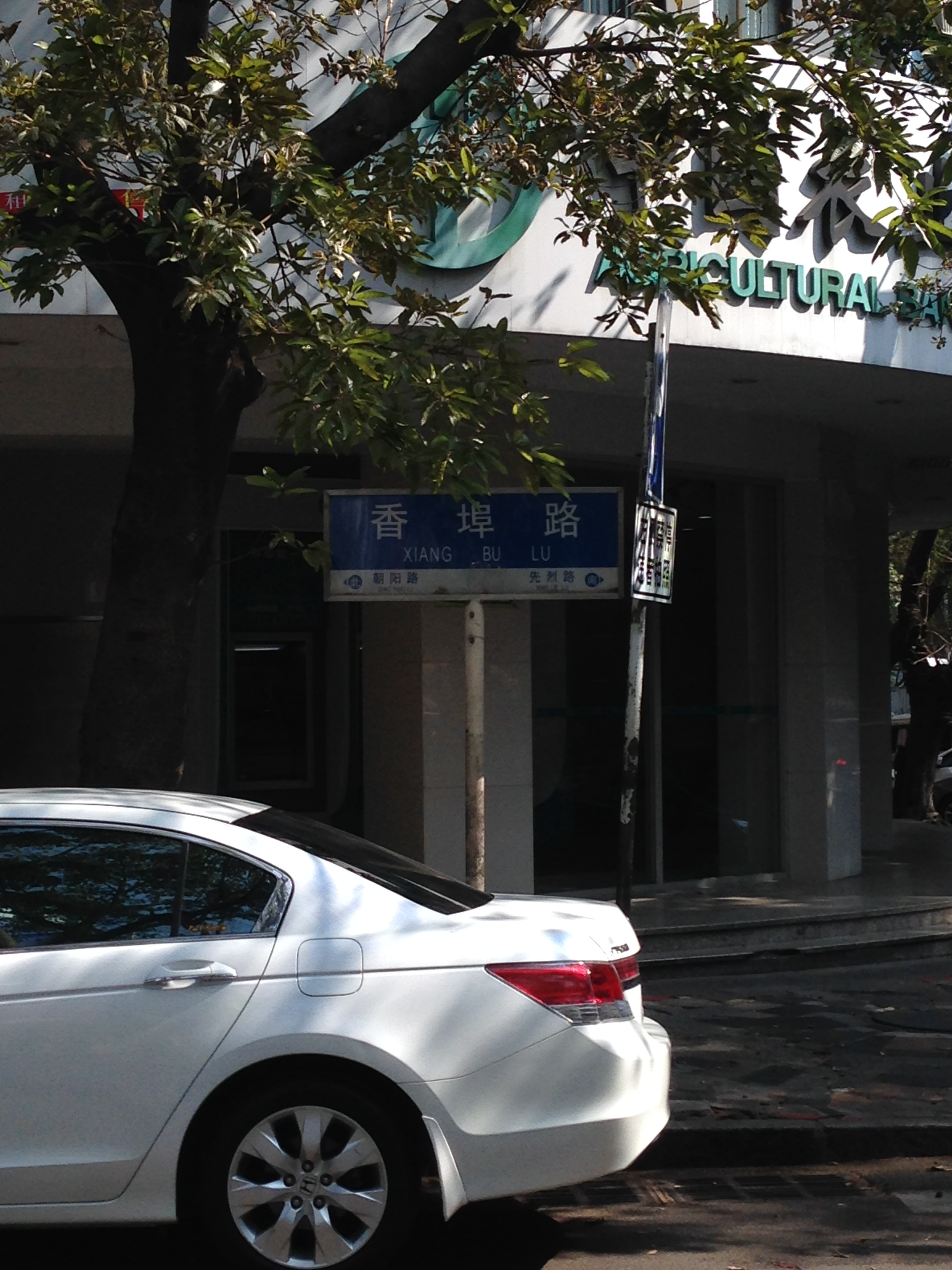 珠海香埠路